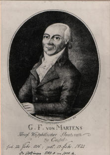 Georg Friedrich von Martens (* 1756; † 1821), Diplomat und Publizist